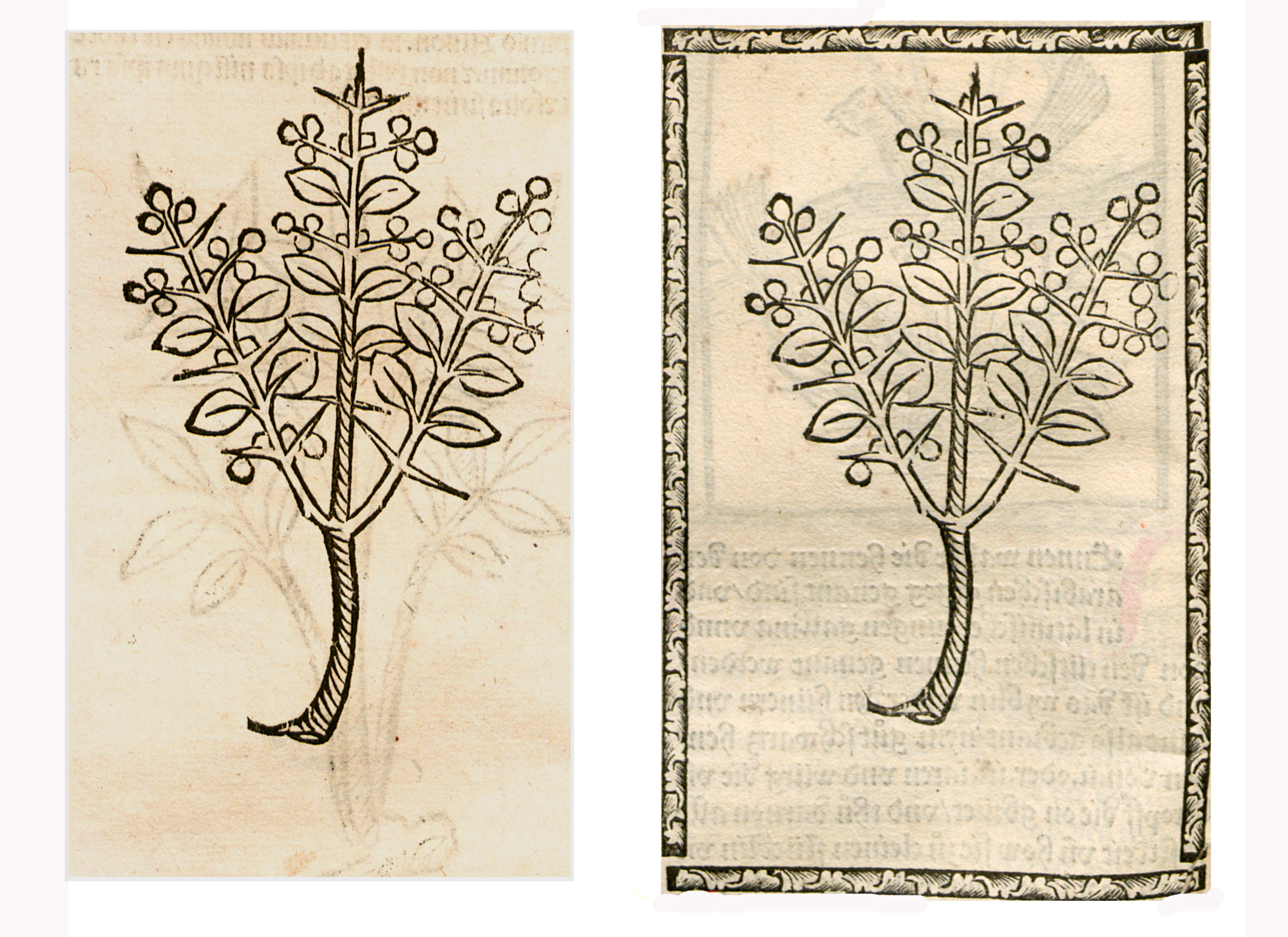 Abbildung von: Heckel Krut (Ononis spinose)